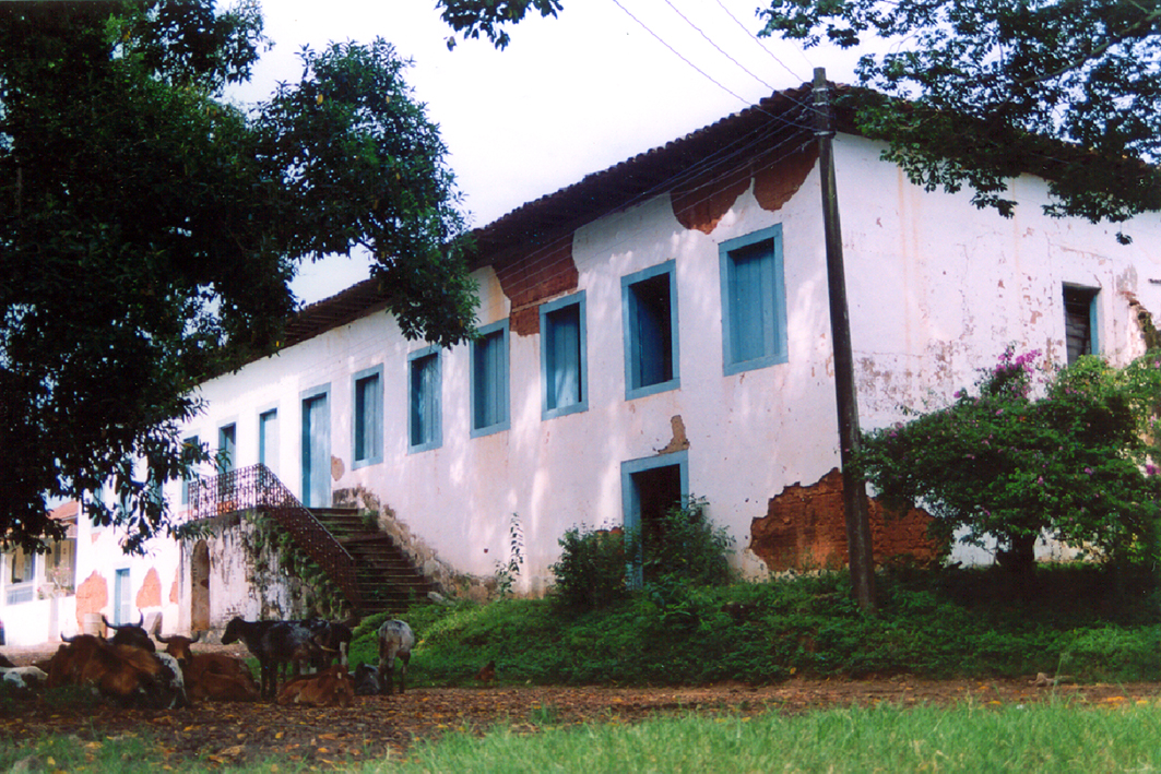 Sede da Fazenda Tatu, Limeira - SP, cosntruída por volta de 1820 em taipa de pilão.